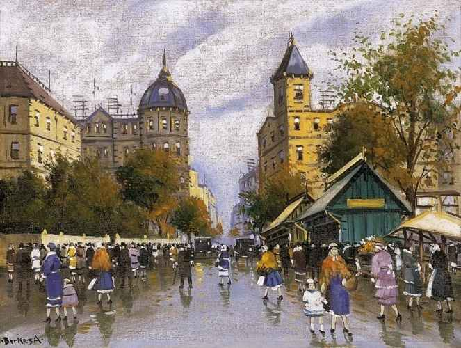 Berkes Antal (1874-1938) festménye a régi Lövölde térről, olaj, vászon; 60 x 80 cm. [1]